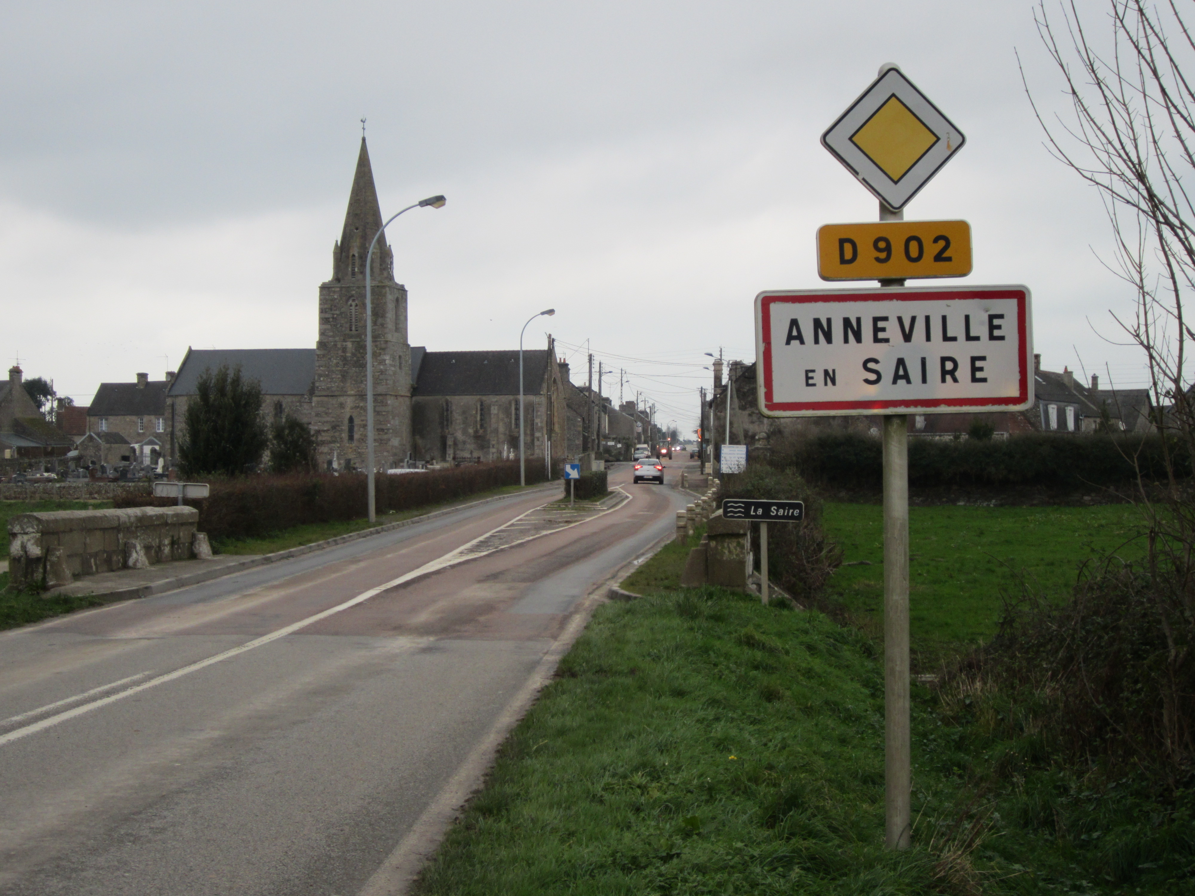 Anneville-en-Saire